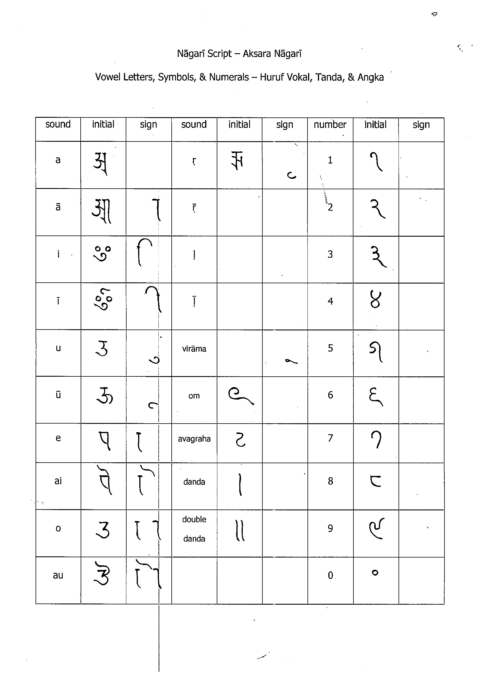 Tabel huruf-huruf vokal, tanda, dan angka Aksara Nagari.